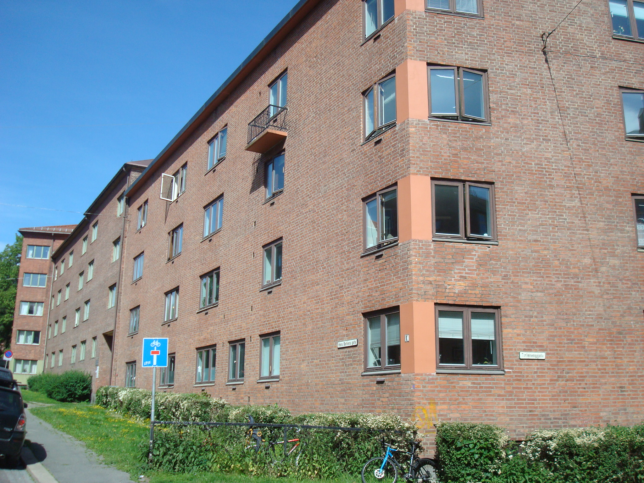 Hans Barliens gate i Oslo, nr. 1.